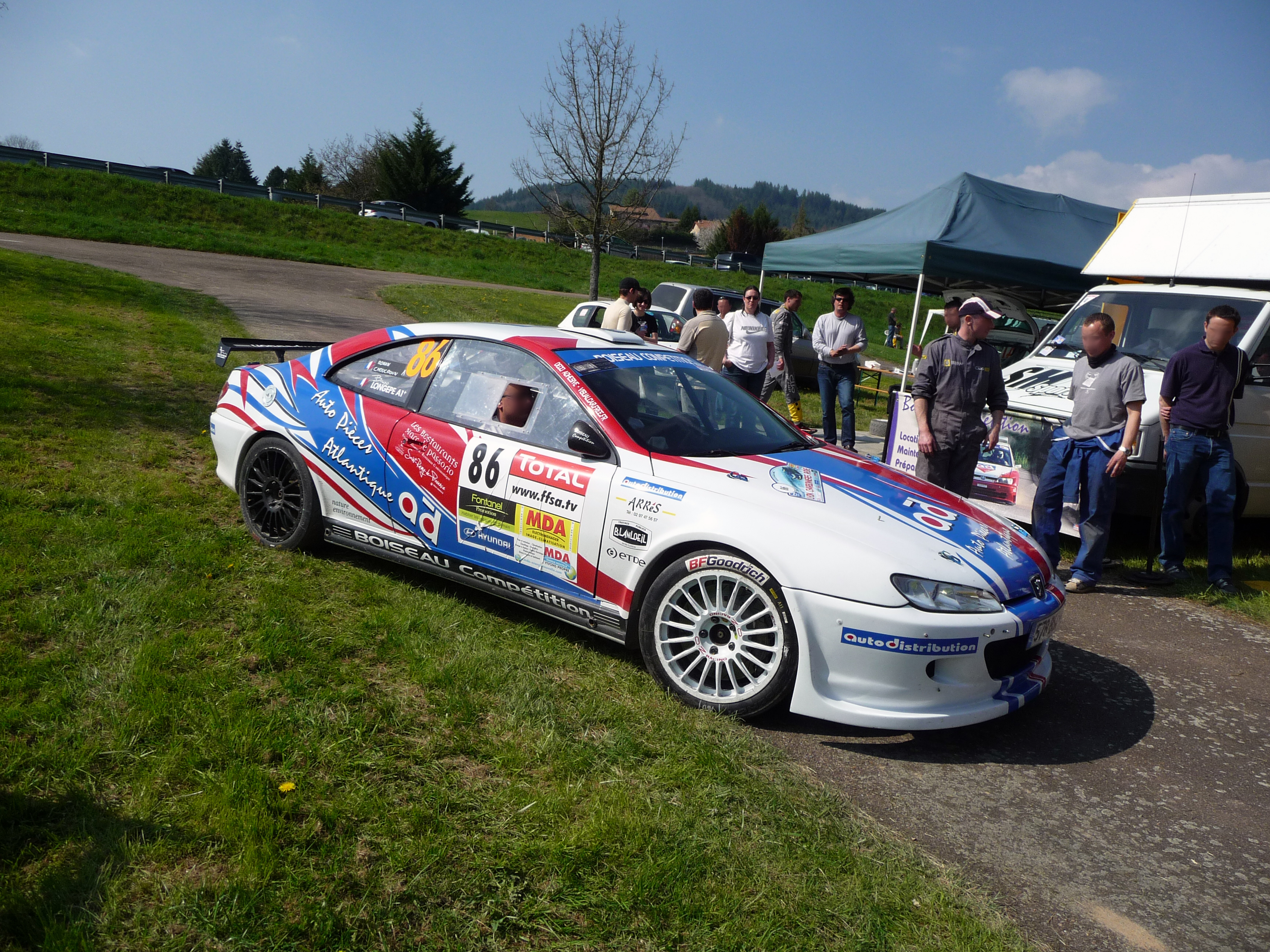 Bruno Longépé et son Peugeot Coupé 406 préparé chez Boisseau Compétition.